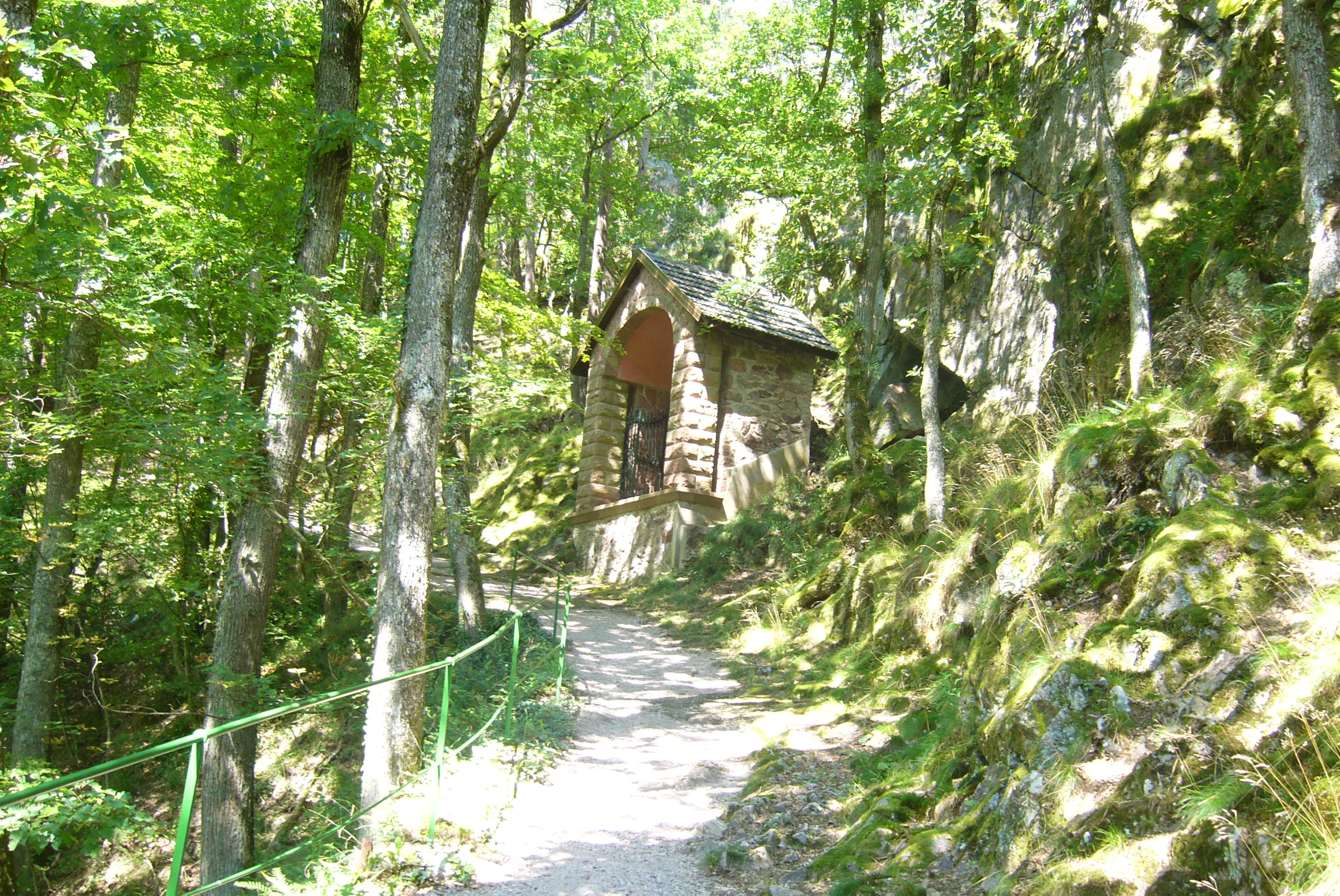 Calvaire sur le sentier qui mène à Dusenbach